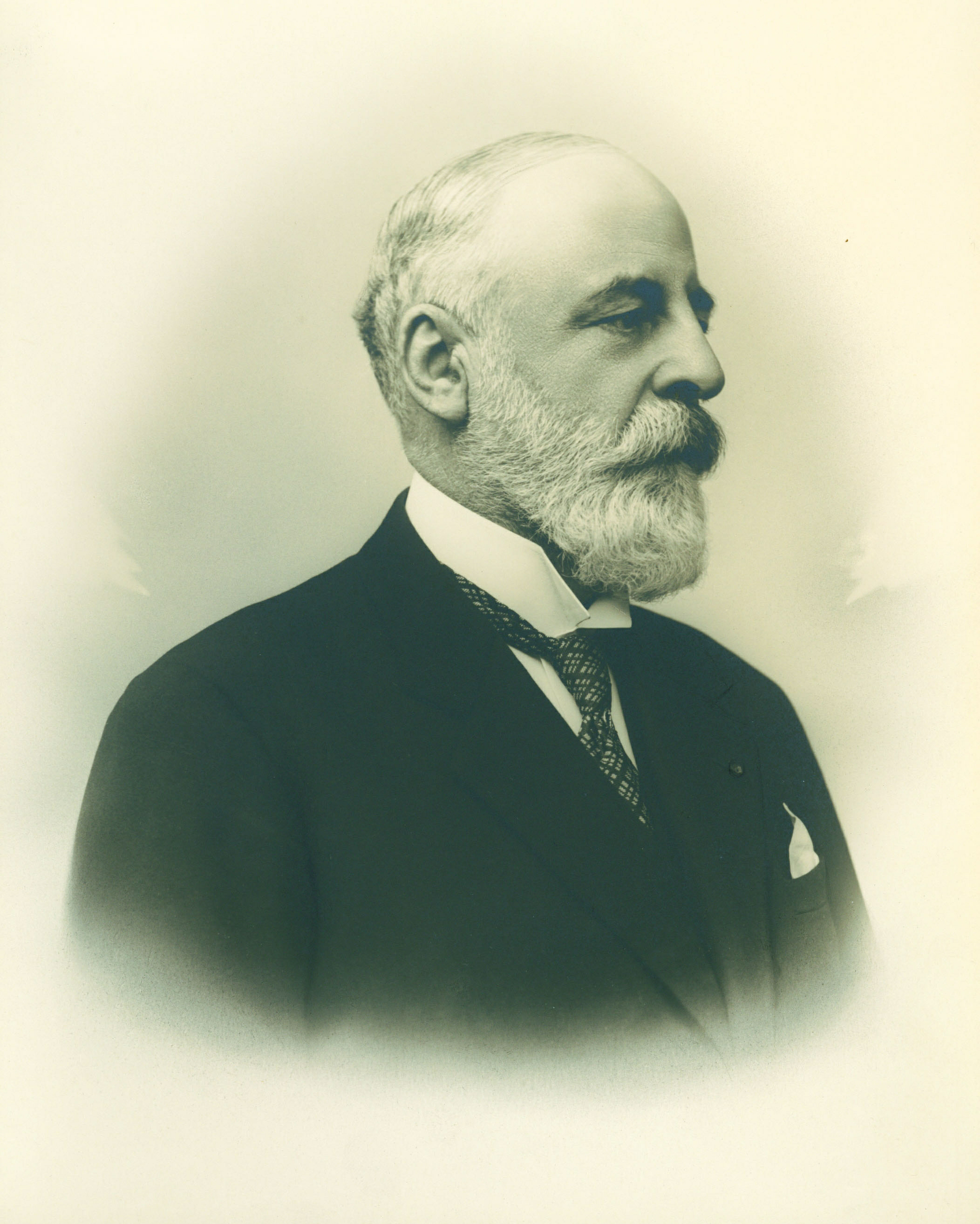 Édouard Peltzer de Clermont. La légende mentionnait "Président de 1896 à 1899".